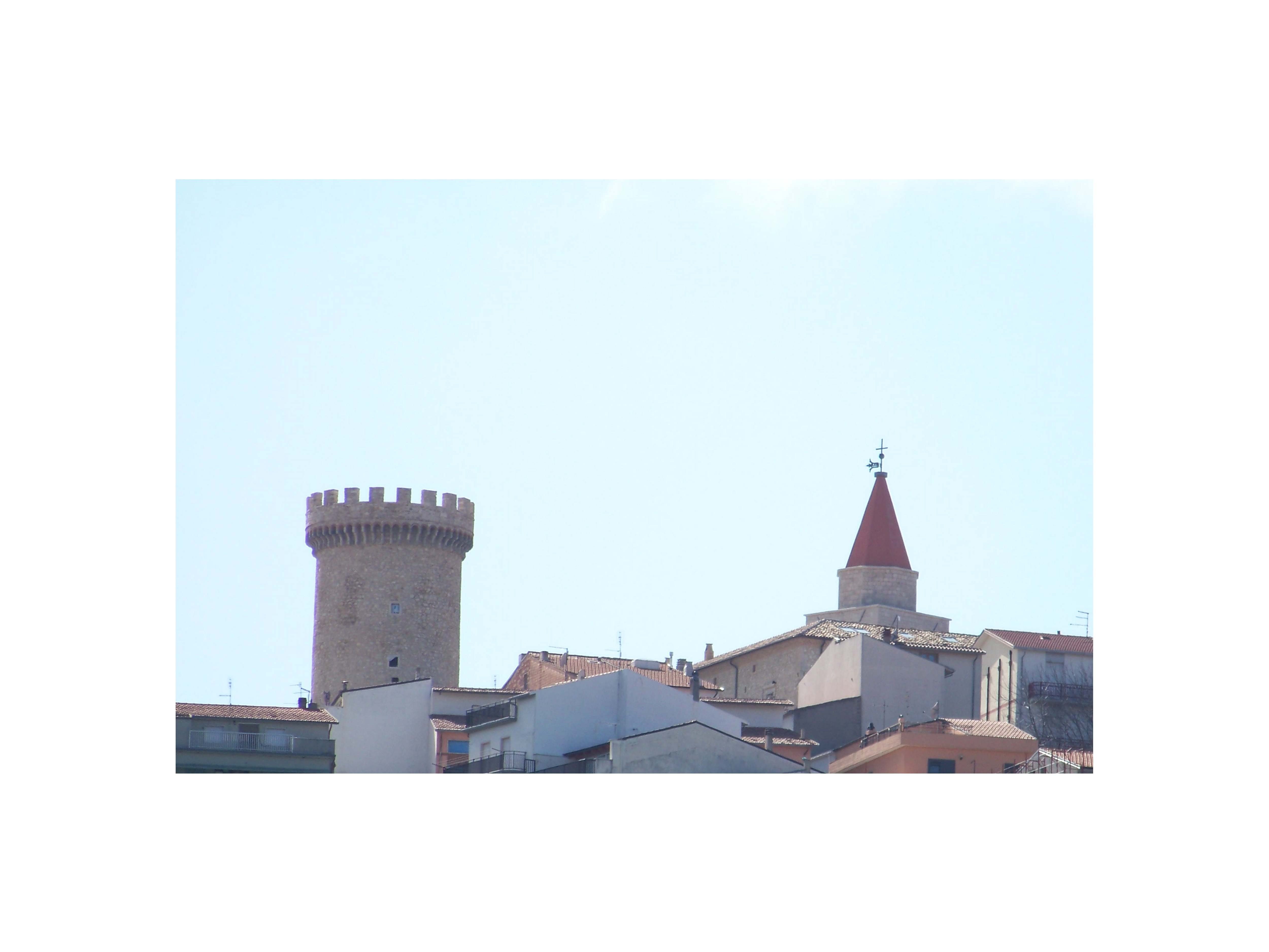 Torre Angioina a sinistra e adestra si può osservare una parte del Palazzo Marchesale e il Campanile della Chiesa Madre